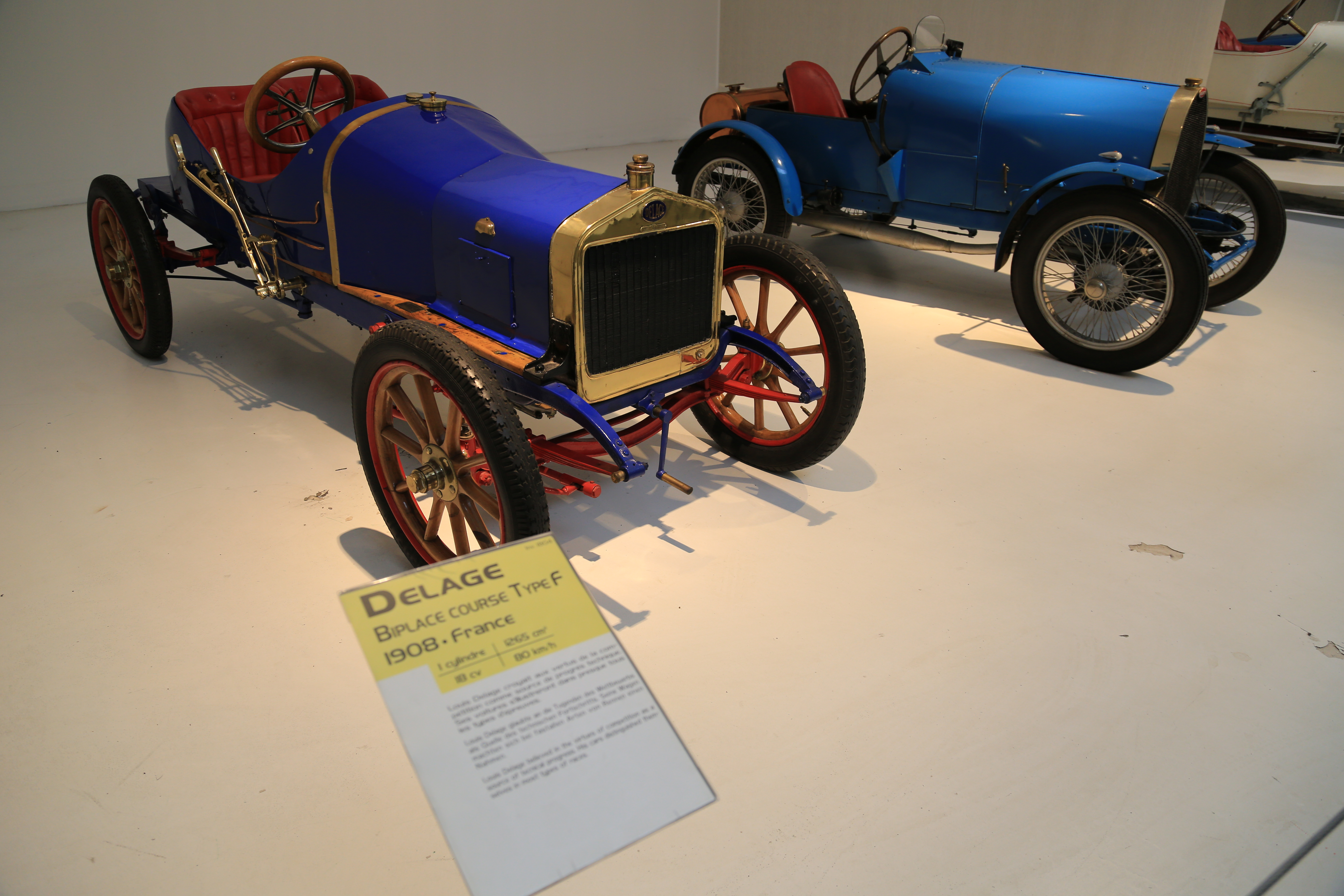 Musée de l'automobile - Mulhouse - Delage - BH5A5912